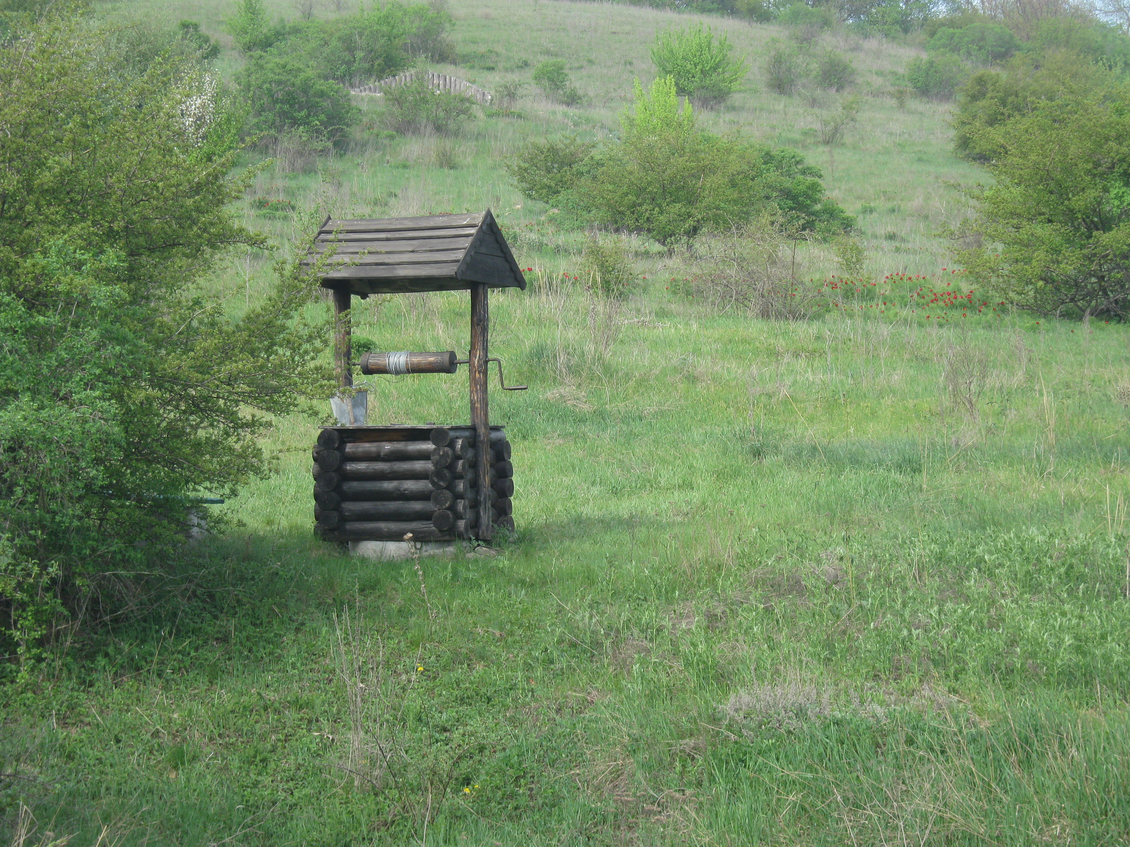 Криниця у Гектовій балці, що є пам'ятником природи місцевого значення і розташована у Добропільському районі Донецької області.